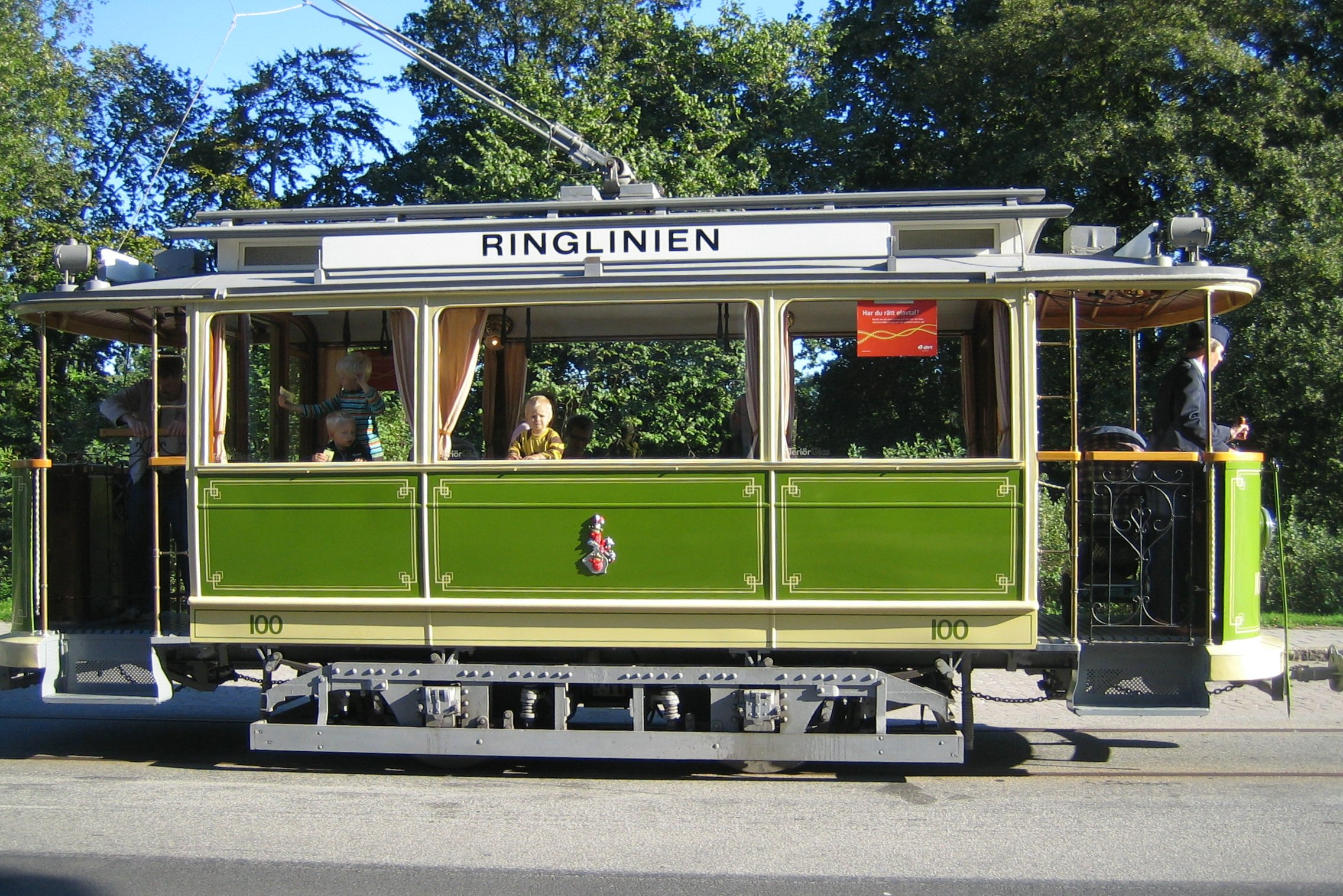 Museispårvagn, Malmö, Sweden